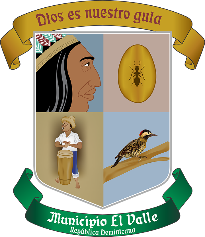 Escudo heráldico de el Municipio El Valle de Hato Mayor